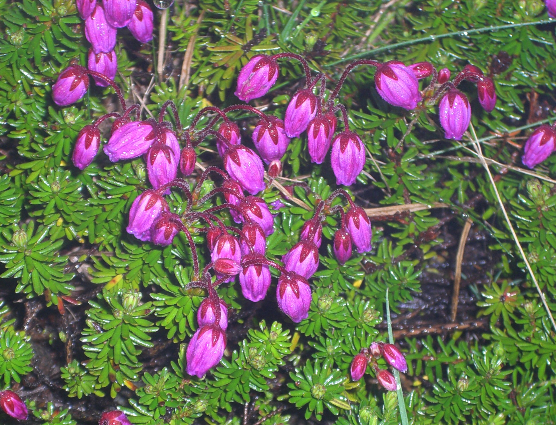 Phyllodoce caerulea at Daisetsu-zan 大雪山のエズノツガザクラ